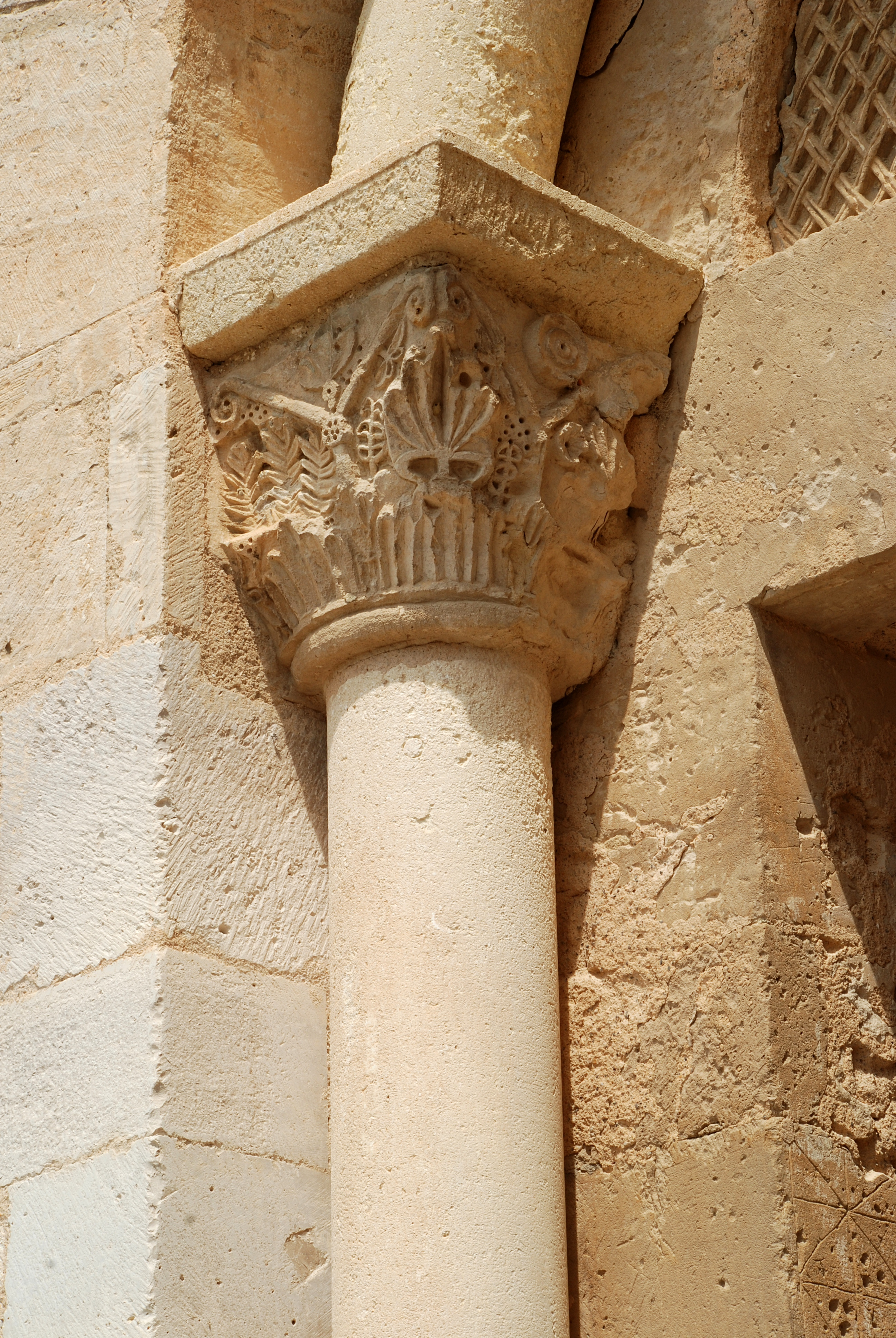 France - Languedoc - Hérault - Église Saint-Martial d'Assas